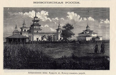 Хурул в Хошоутовском улусе. Астраханская губерния.